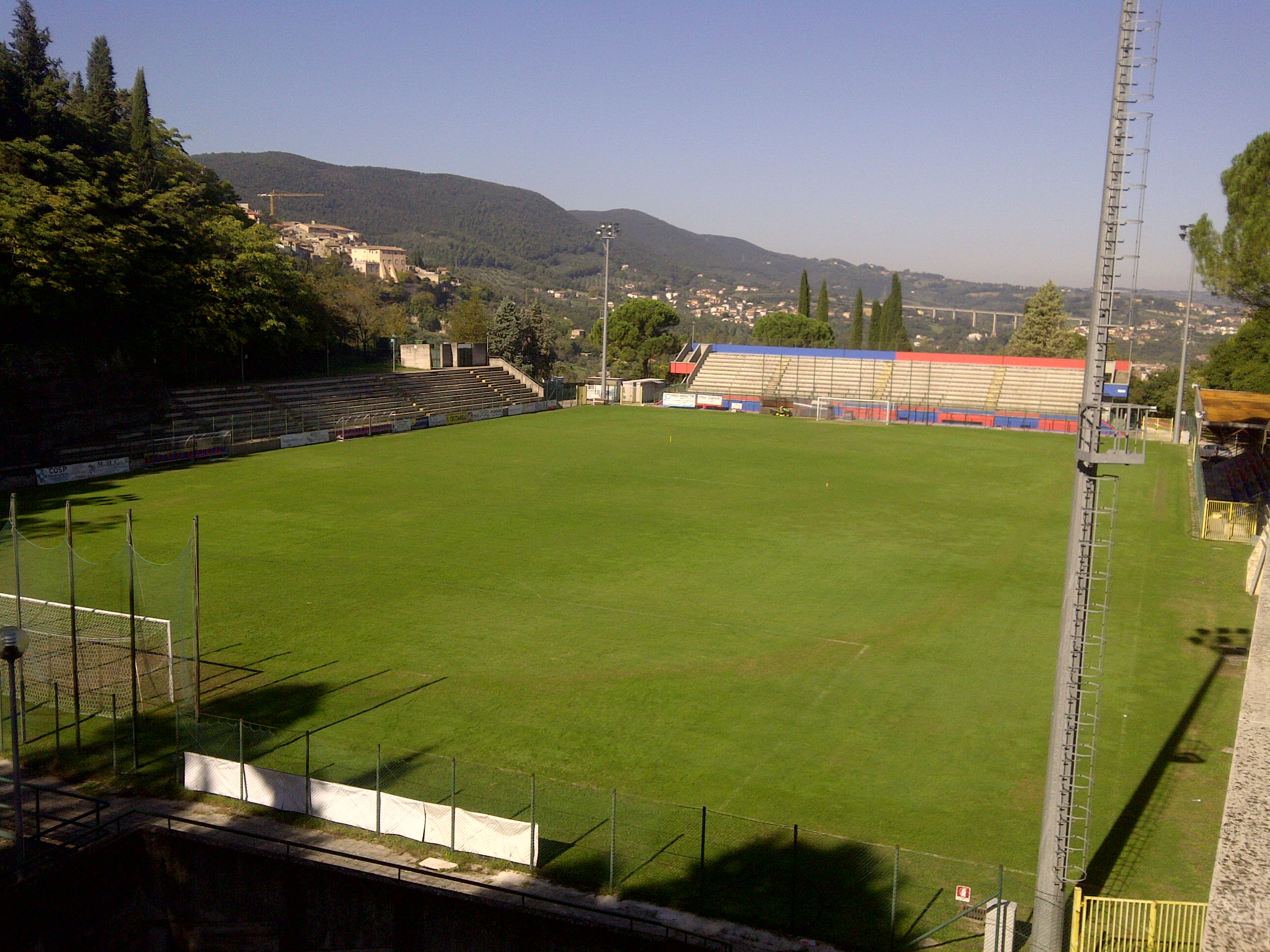 Lo Stadio S.Girolamo di Narni visto dalla Curva Sud